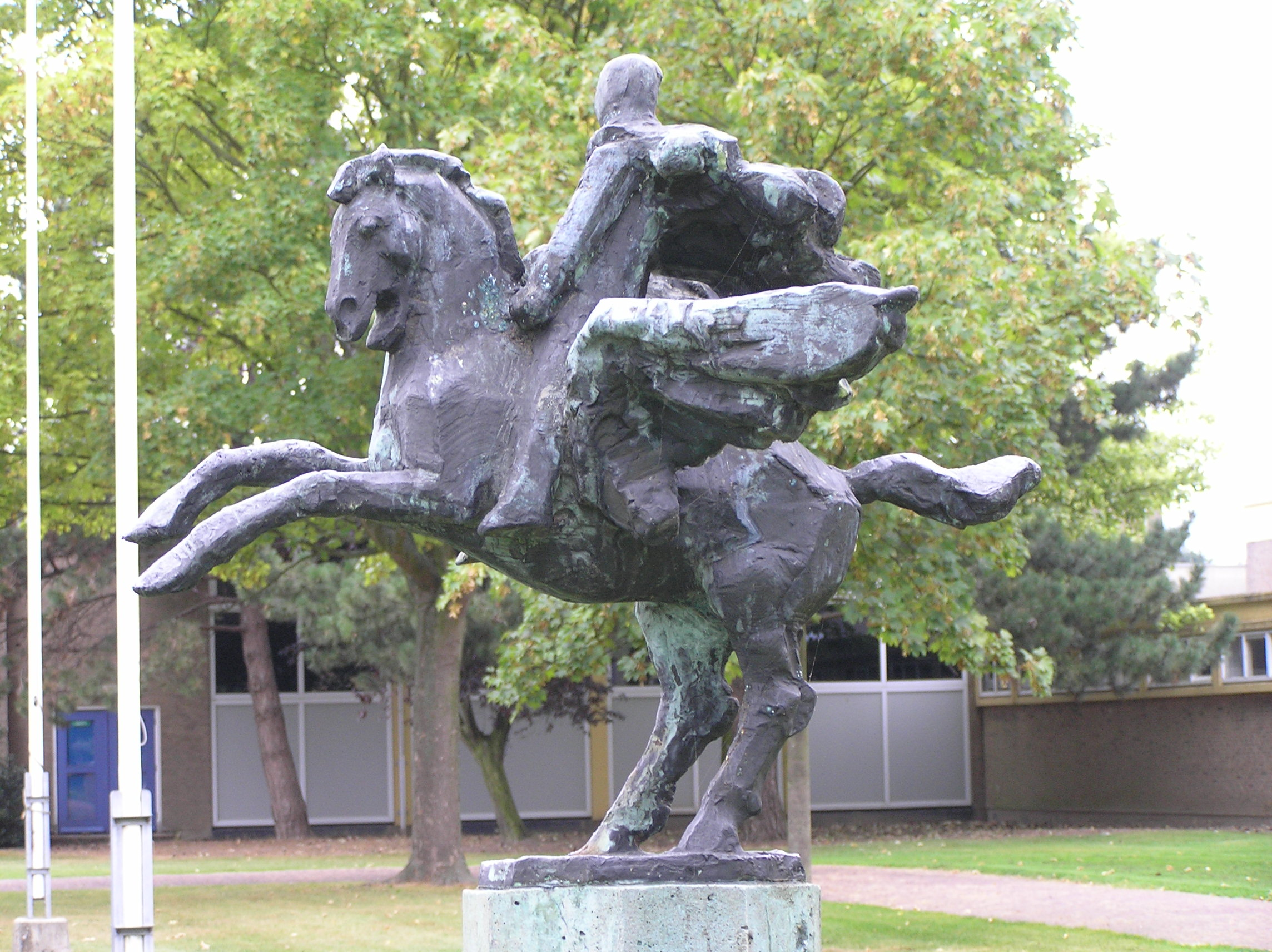 "Pegasus" van Frank Letterie, beeld aan het Goese Lyceum aangeboden door ouders en reünisten ter gelegenheid van het eeuwfeest in 1965. Van Dusseldorpstraat, Goes.